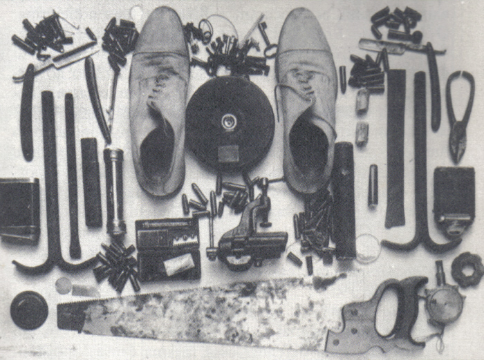 "Equipamento de trabalho" do criminoso Gino Meneghetti apreendido pela polícia paulistana em 1926